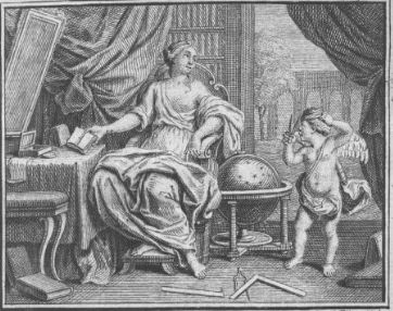 Auteur de l'ouvrage : VOLTAIRE, François Marie Arouet de Ouvrage : Elemens de la philosophie de Newton, mis à la portée de tout le monde par Mr de Voltaire Edition : Amsterdam : Etienne Ledet, 1738 Dessinateur : Duburg, F. Graveur : Folkema Empl. de l'image : p. 43 Peut être représentation de Gabrielle Émilie du Châtelet Adresse permanente de cette image